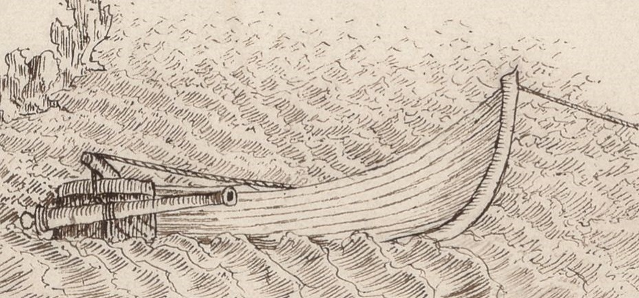 Détail d'un plan d'époque montant la récupération des canons par l'expédition de secours lancée en octobre 1678 après le naufrage de l'escadre de d'Estrées aux îles d'Aves.